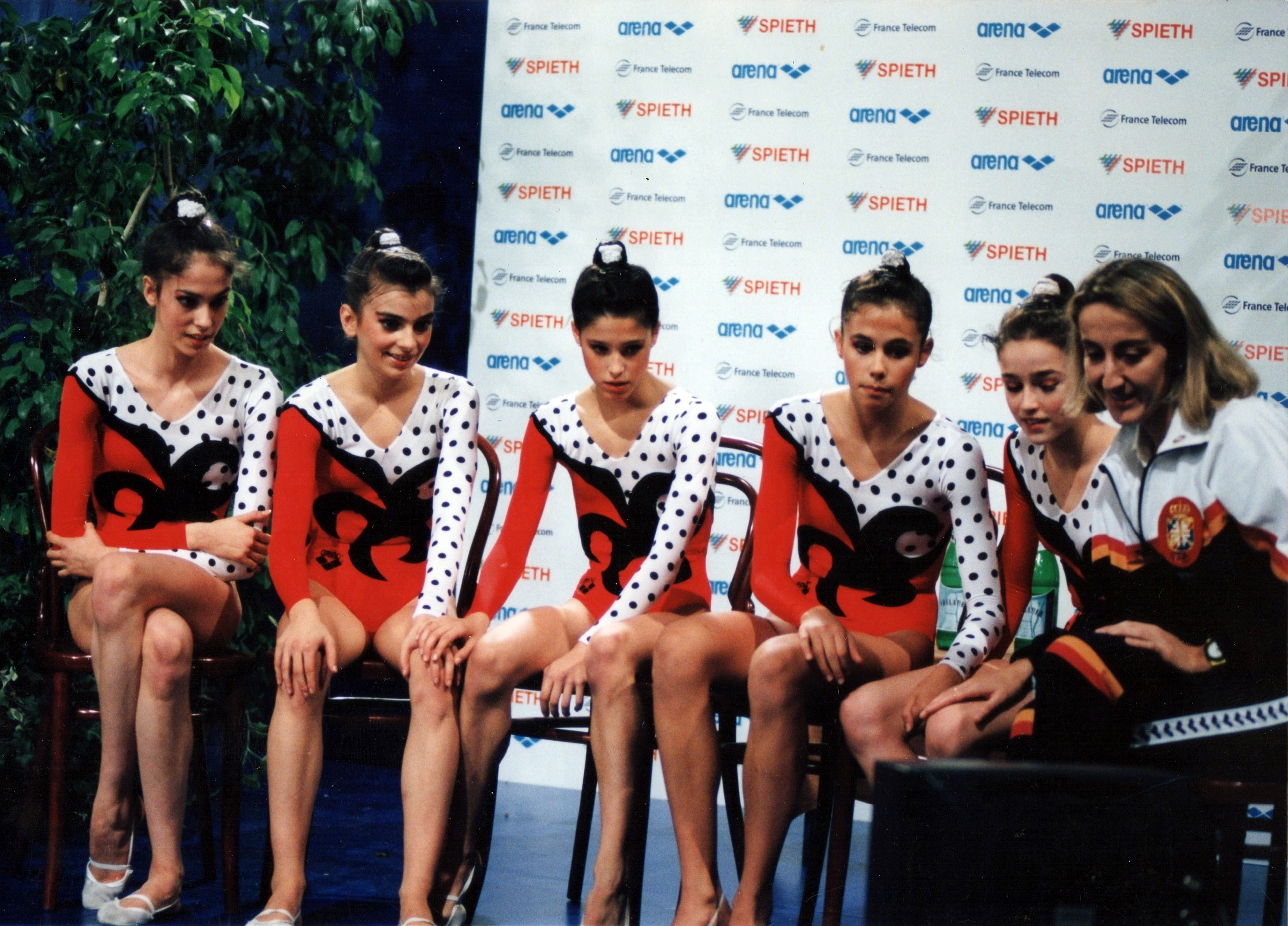 Conjunto español de gimnasia rítmica esperando la nota definitiva en el concurso general en el Mundial de Viena en 1995. Foto facilitada por María Fernández Ostolaza.